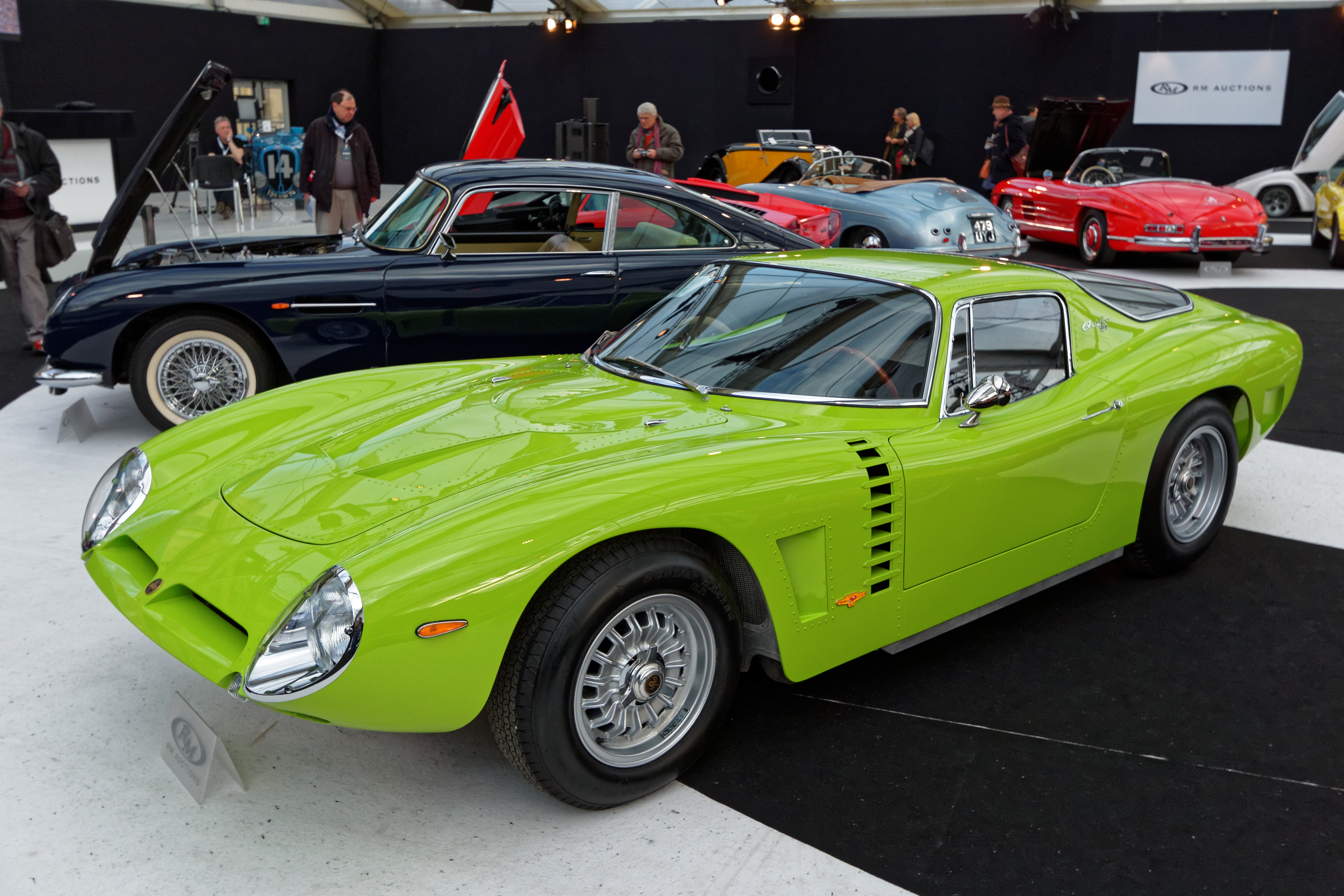 La vente aux enchères RM auctions aux pied des Invalides à Paris le 4 février 2015.